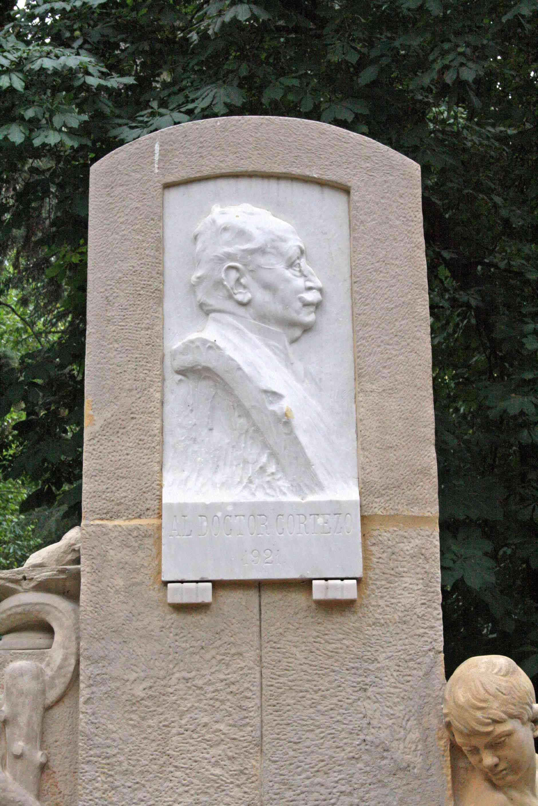 Monumento al doctor Cortezo en el Parque del Retiro de Madrid (España). Detalle.